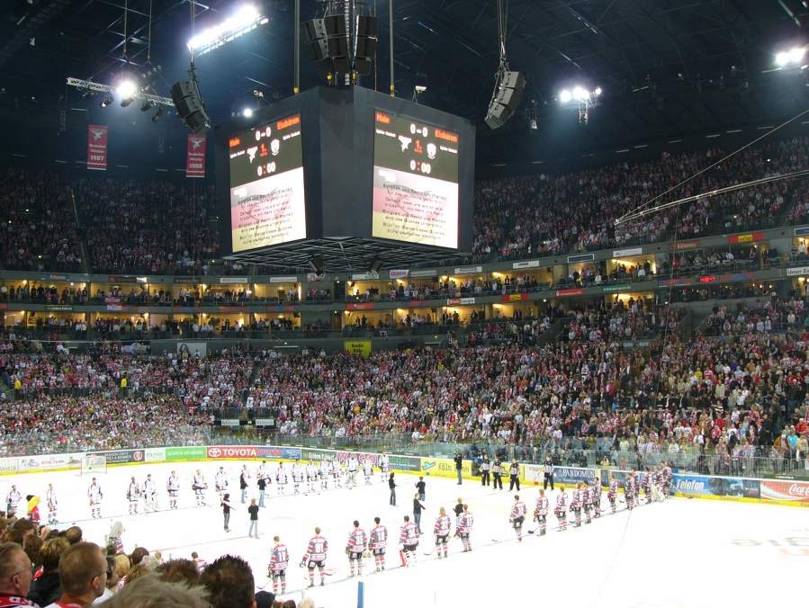 Singen der Nationalhymne vor dem vierten Spiel der Finalserie gegen die Eisbären Berlin in der Saison 2007/08.